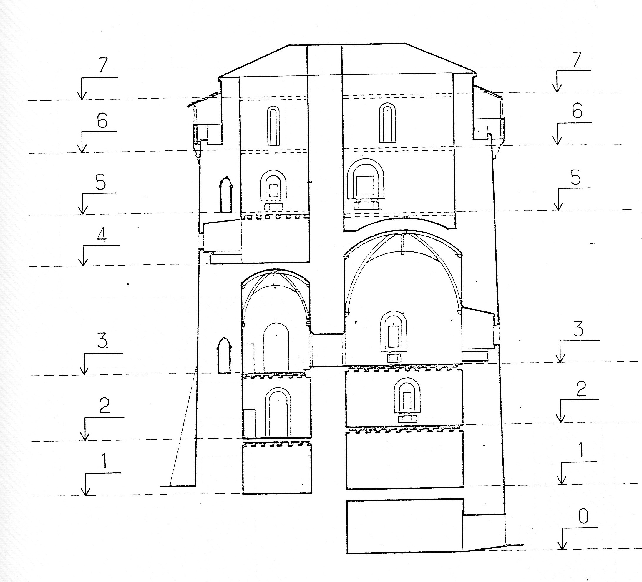 Plan de coupe côté nord du donjon de Bazoges en Pareds